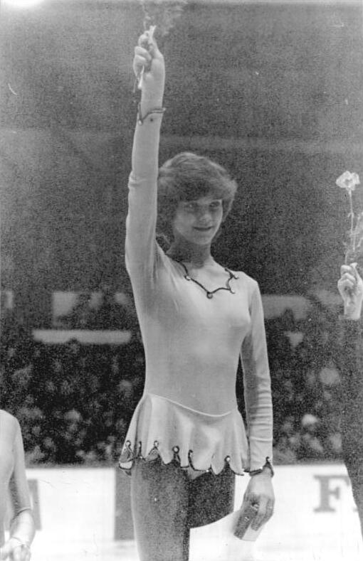 Carola Paul PI-CTK-9.11.80-BRNO: Bei den internationalen Eiskunstlauf-Wettbewerben "Prager Schlittschuh" siegte die DDR-Läuferin Carola Paul (SC Einheit Dresden) in der Damenkonkurrenz mit knappem Vorsprung vor Anna Kondraschewa (UdSSR).